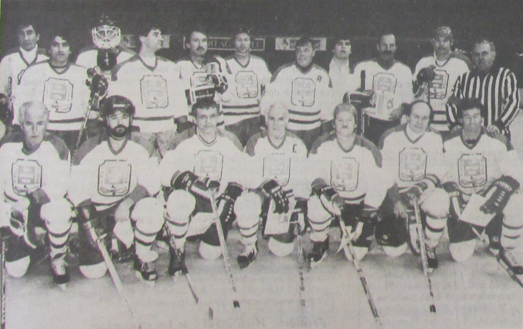 Équipes des Étoiles légendaires de la NHL ayant disputé une tournée en Europe à l'hiver 1986-87